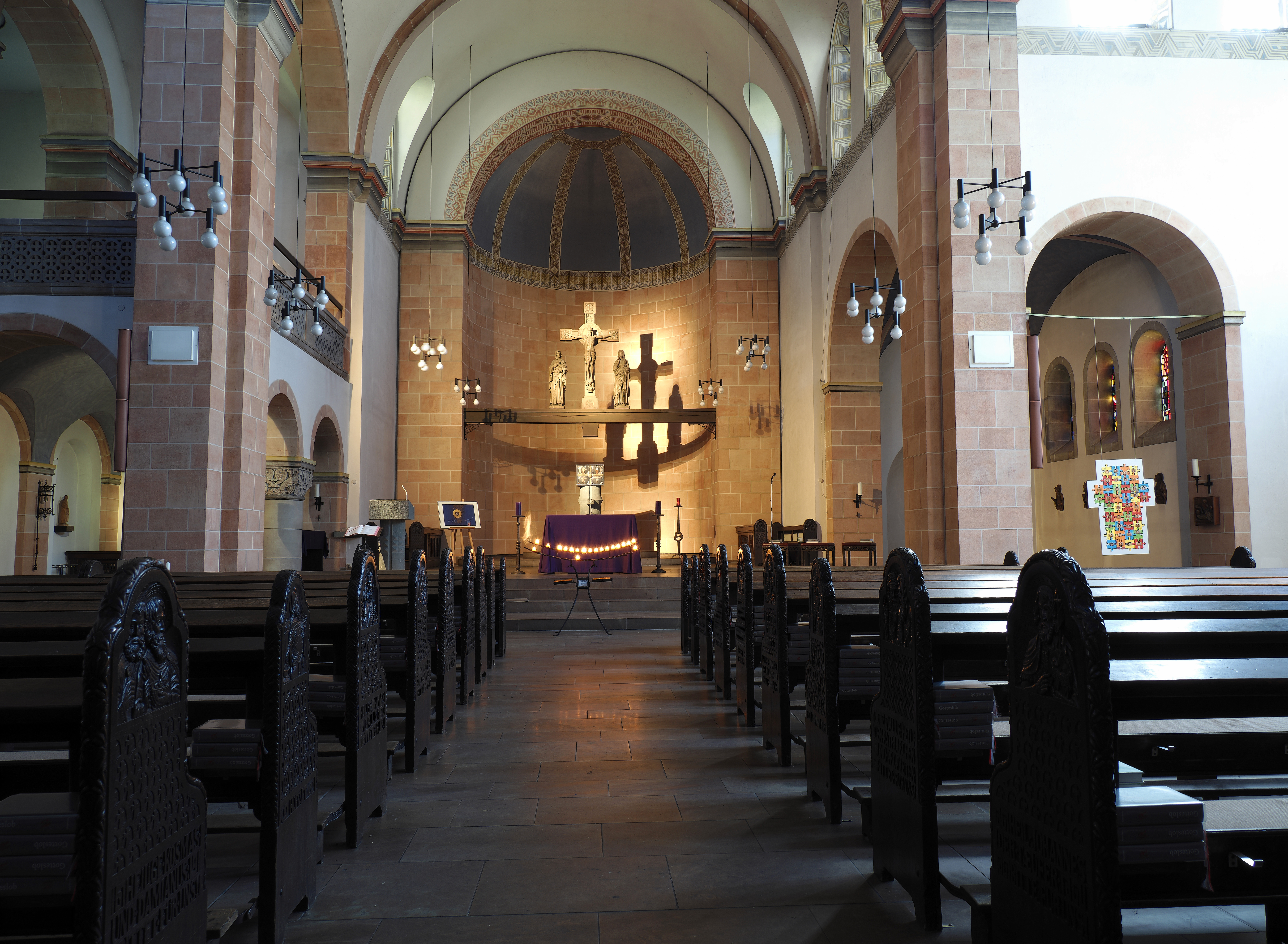 Katholische Kirche Sankt Elisabeth in Bochum-Gerthe, Mittelschiff. This is a photograph of an architectural monument.